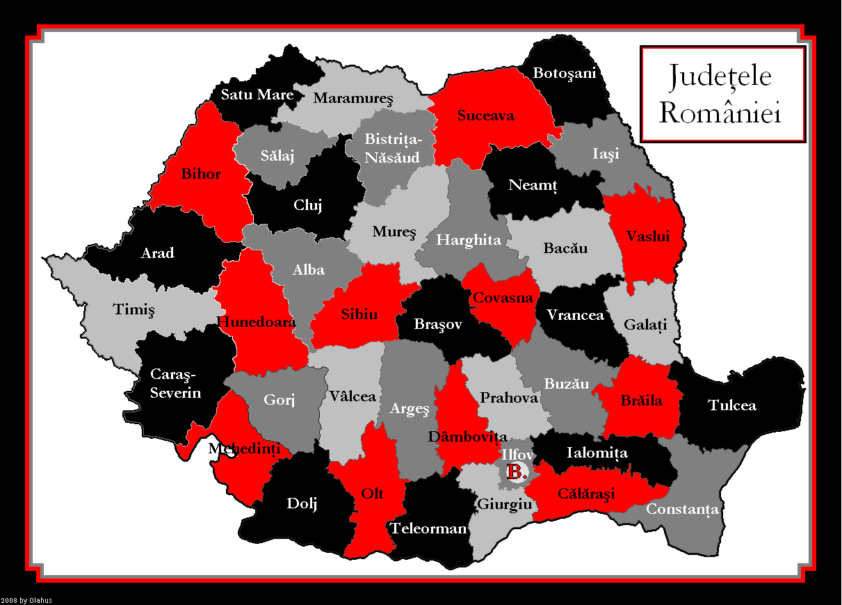 Judeţele României